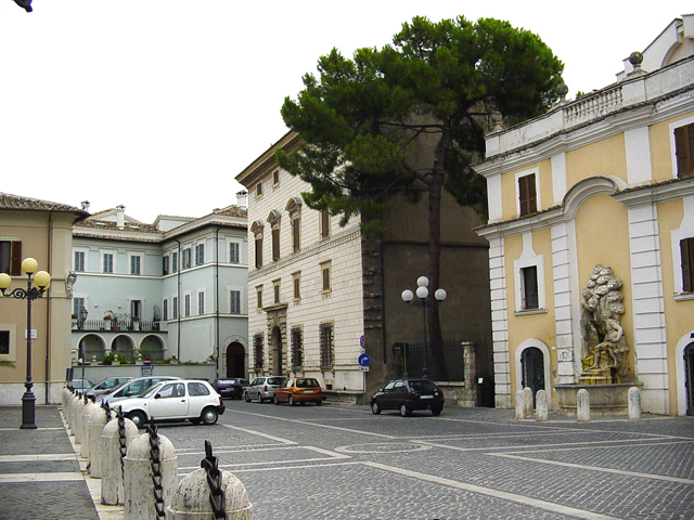 Terni, Piazza del Duomo: vista dal sagrato del Duomo con la fontana.